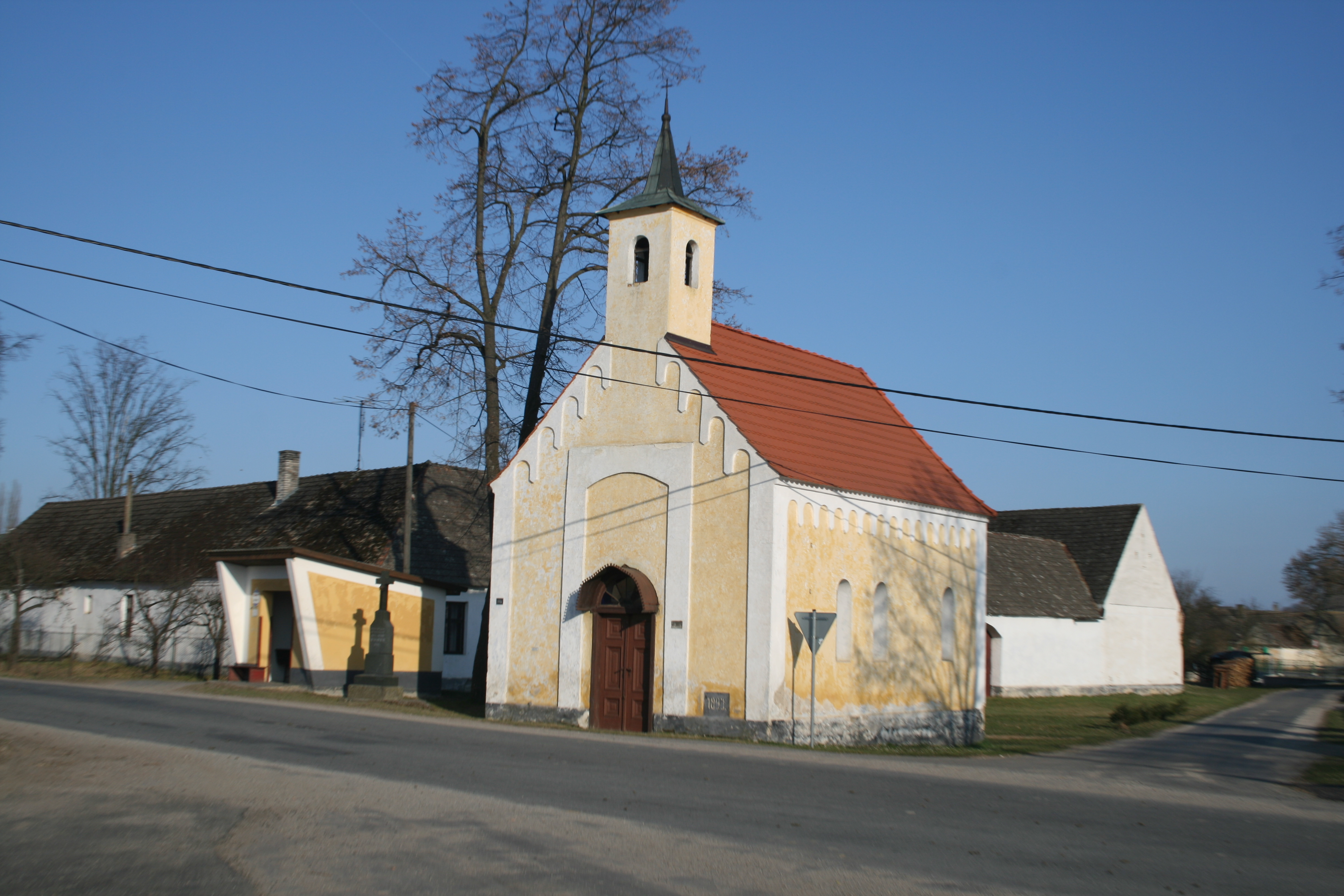 Vlastiboř - Kaple na návsi